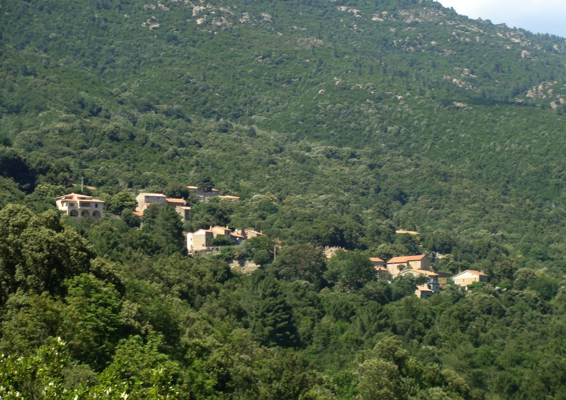 Le village de Chisa vu de la route d'accès près de Bura.